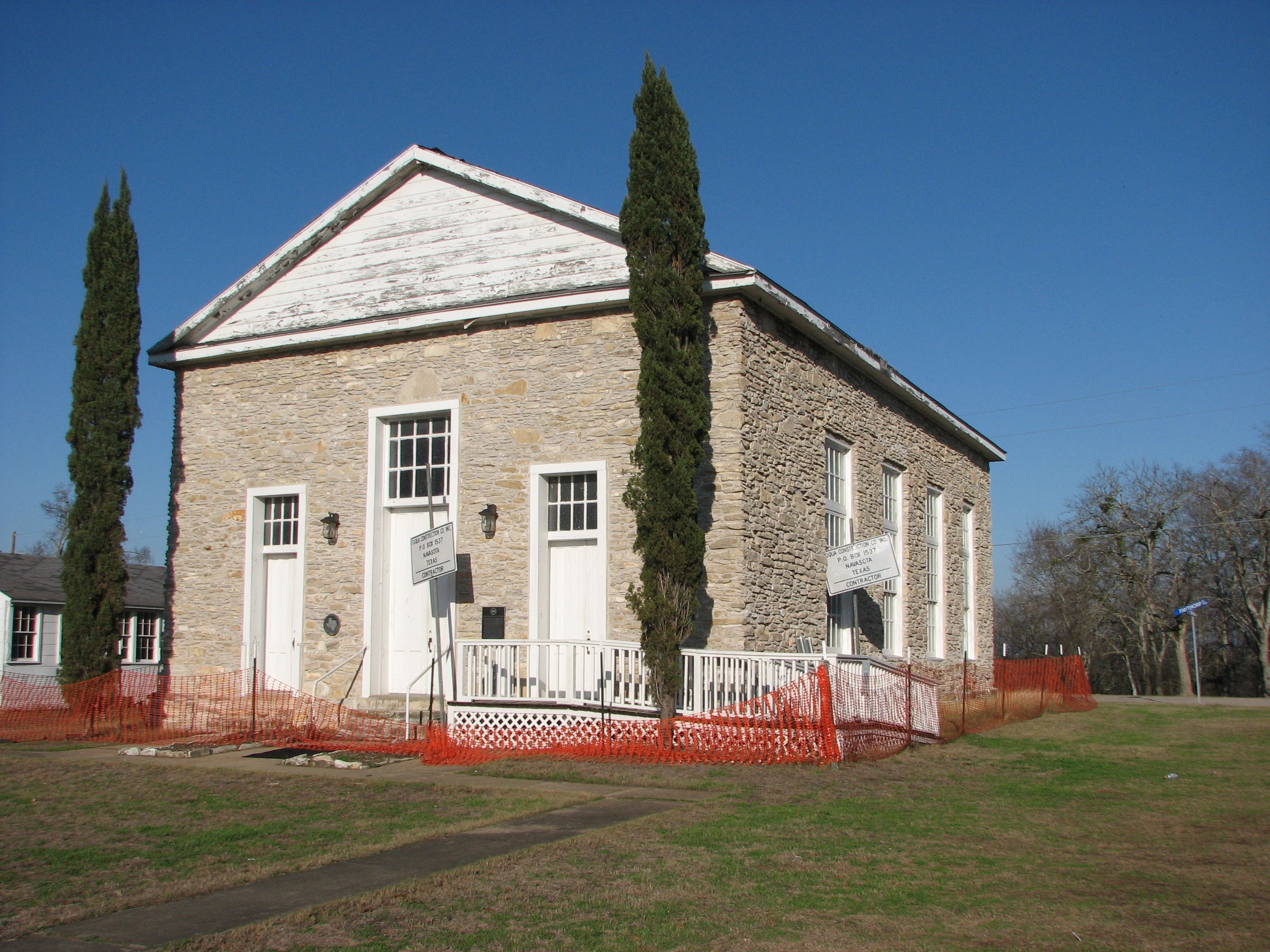 Anderson Baptist Church